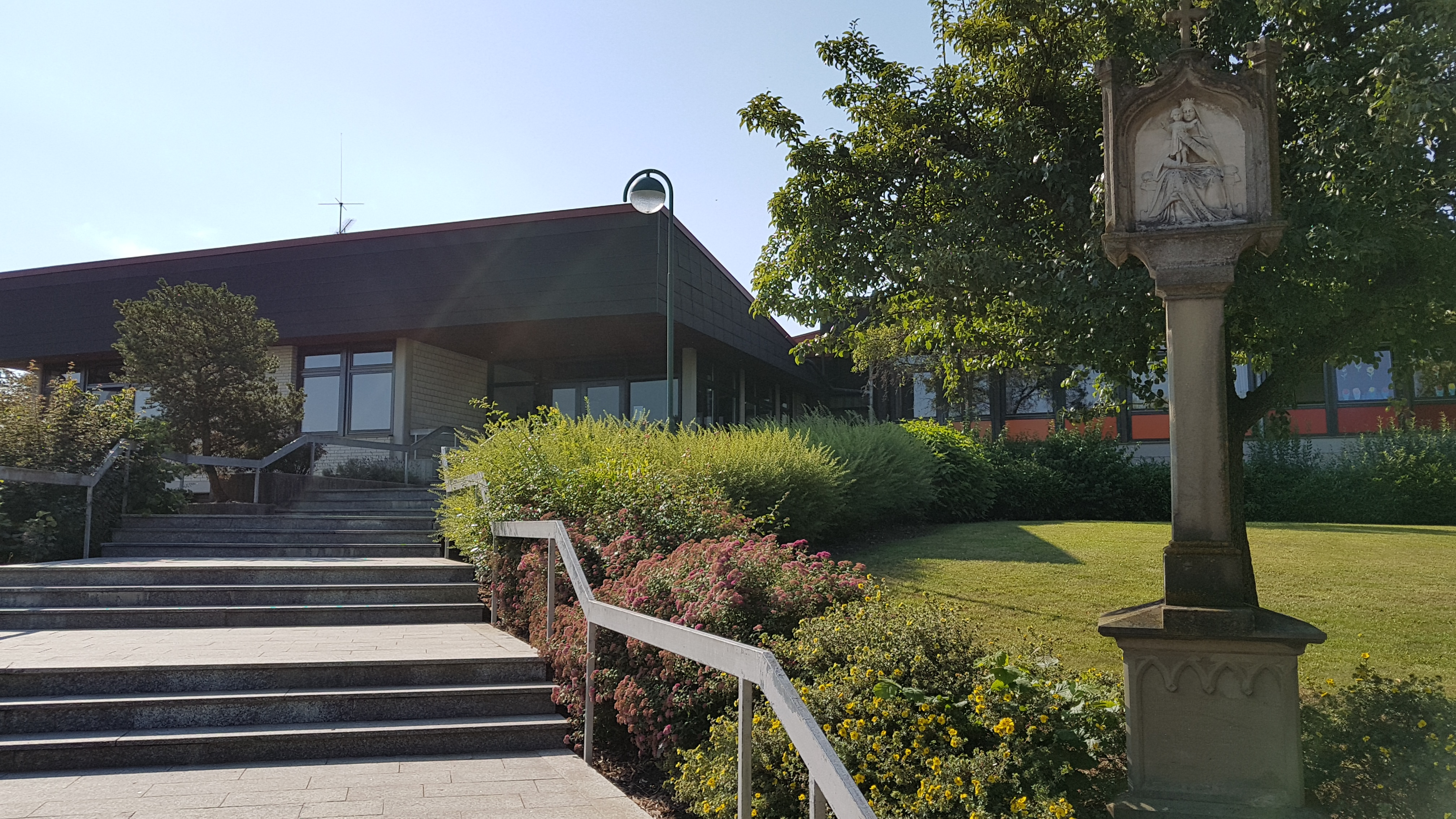 Grundschule Assamstadt Bildstock